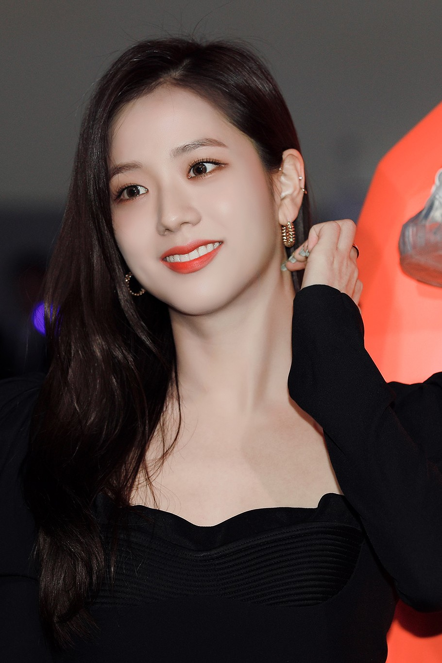 Kim Ji-soo no evento da grife Jimmy Choo, em 9 de janeiro de 2020